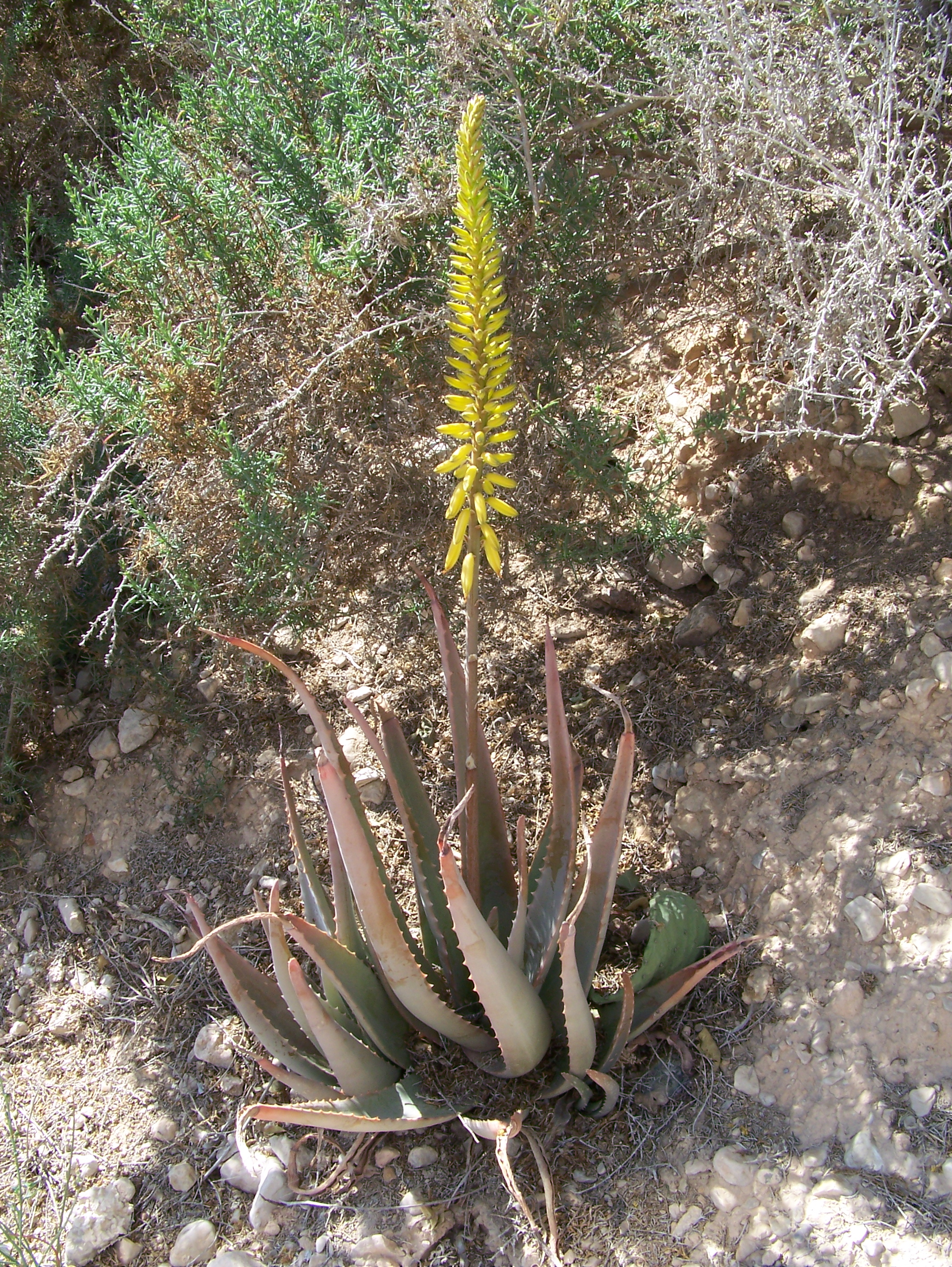 Aloe vera (Sabila) : porte general en plena antesis - Colonia Ilicitana, Albatera (Alicante, España).